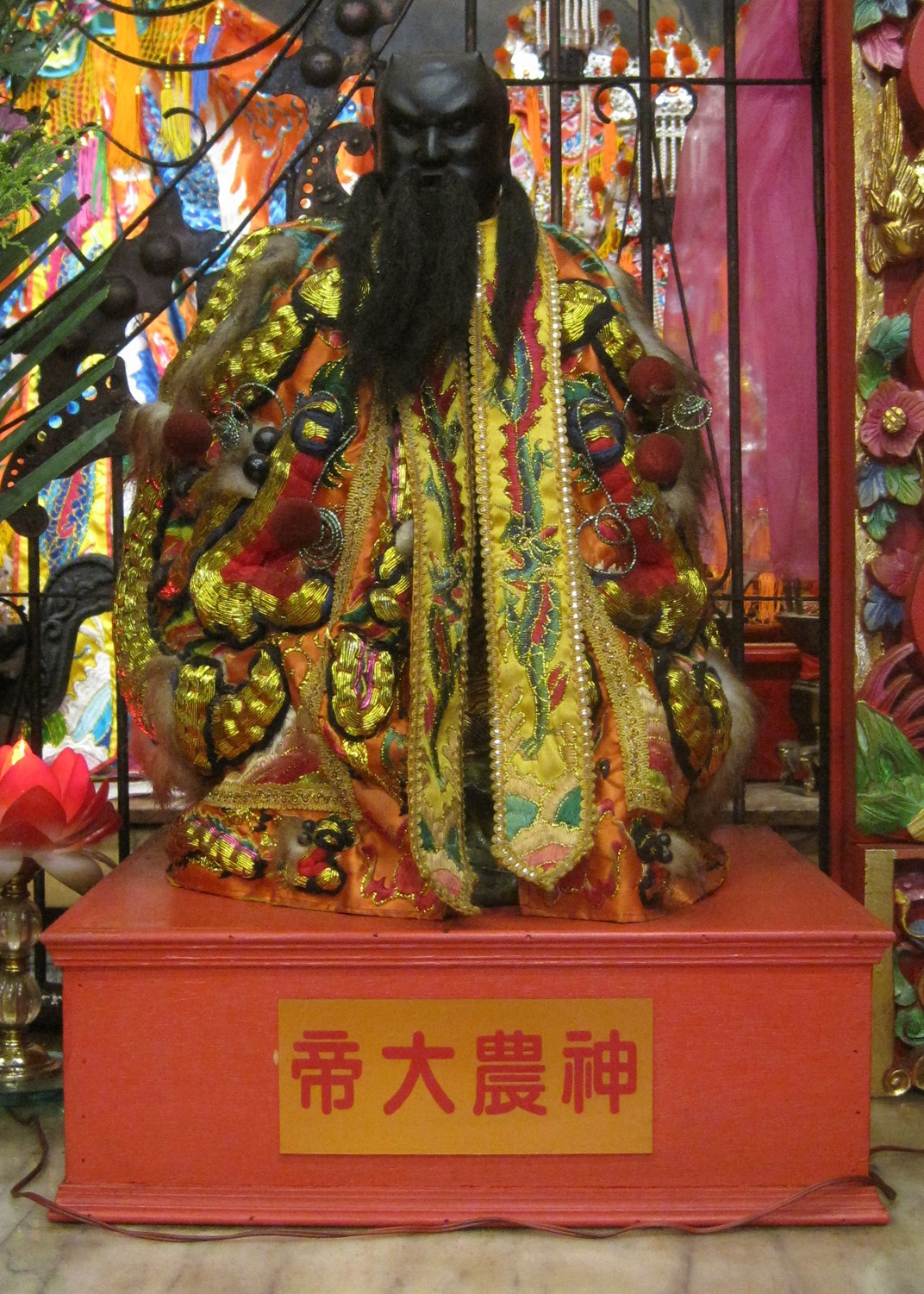 新化朝天宮神農大帝神像